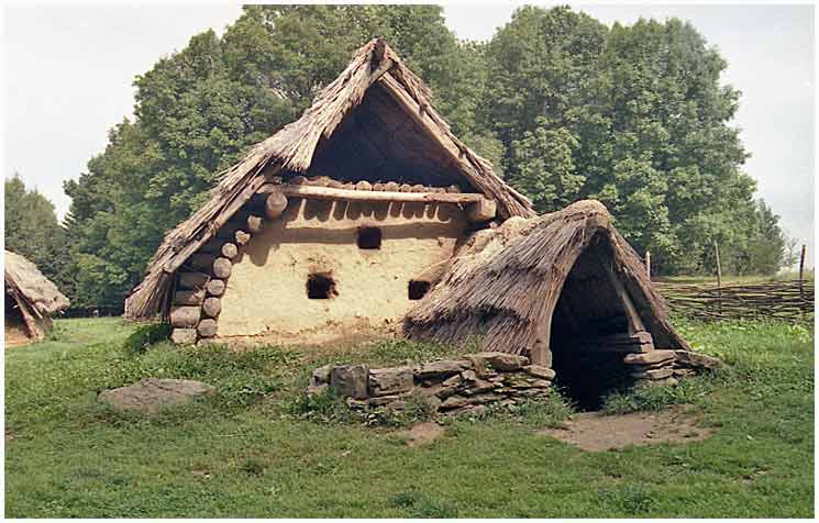 Archeoskanzen Villa Nova v Uhřínově - roubená polozemnice